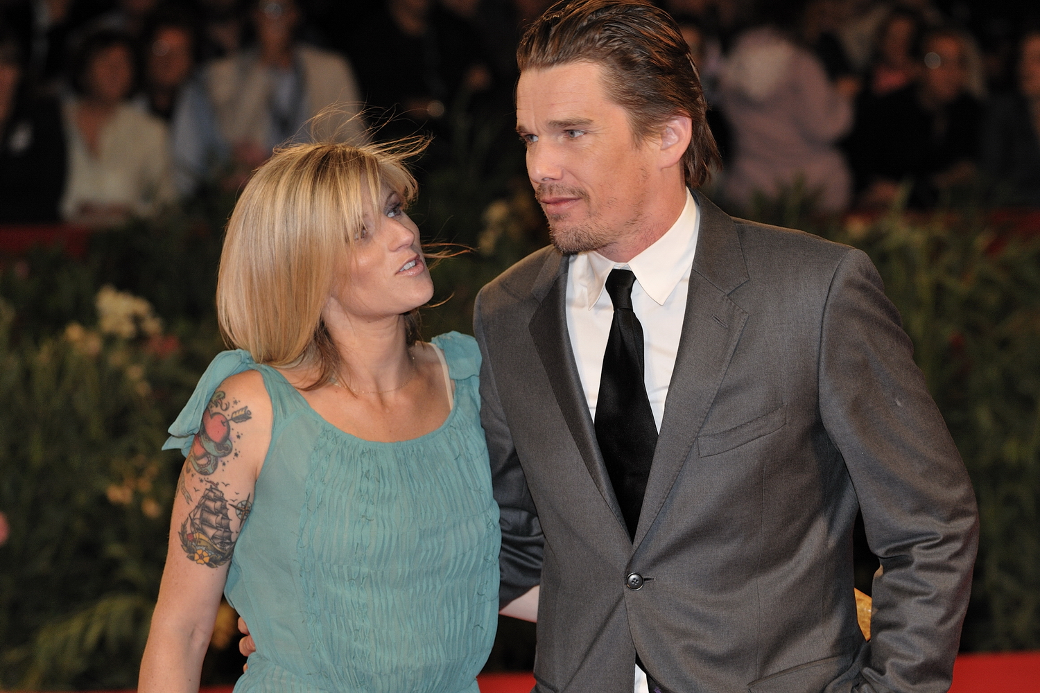 66ème Festival du Cinéma de Venise (Mostra), 8ème jour (07/09/2009) Tapis rouge avec Ethan Hawke et Wesley Snipes et le réalisateur Antoine Fuqua pour le film : Brooklyn's finest